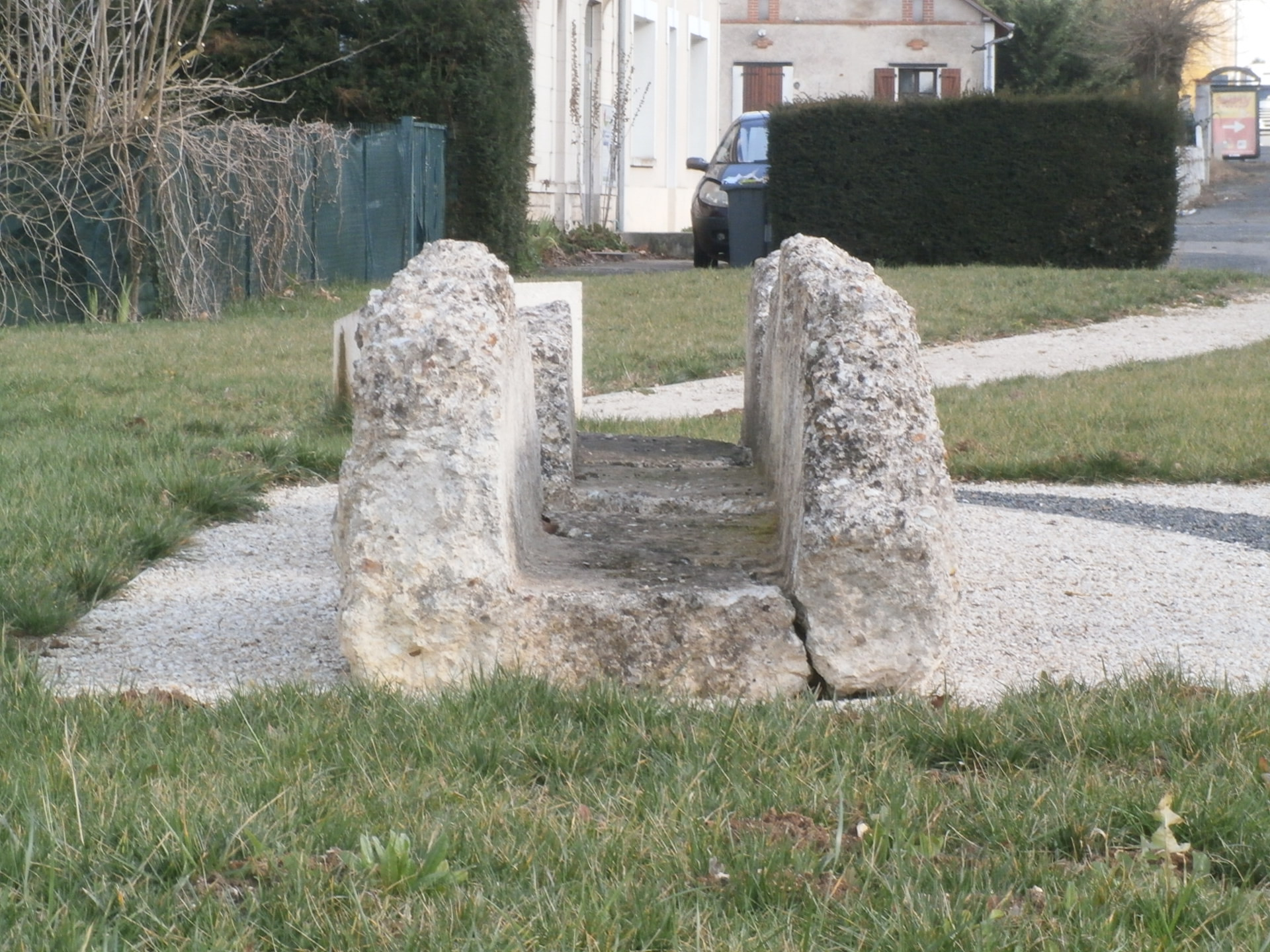 Vestiges de l'aqueduc exposés à Véretz